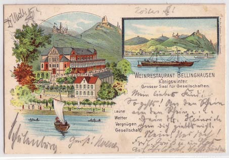 Weinlokal Bellinghausen in Königswinter, Lithographie von 1899